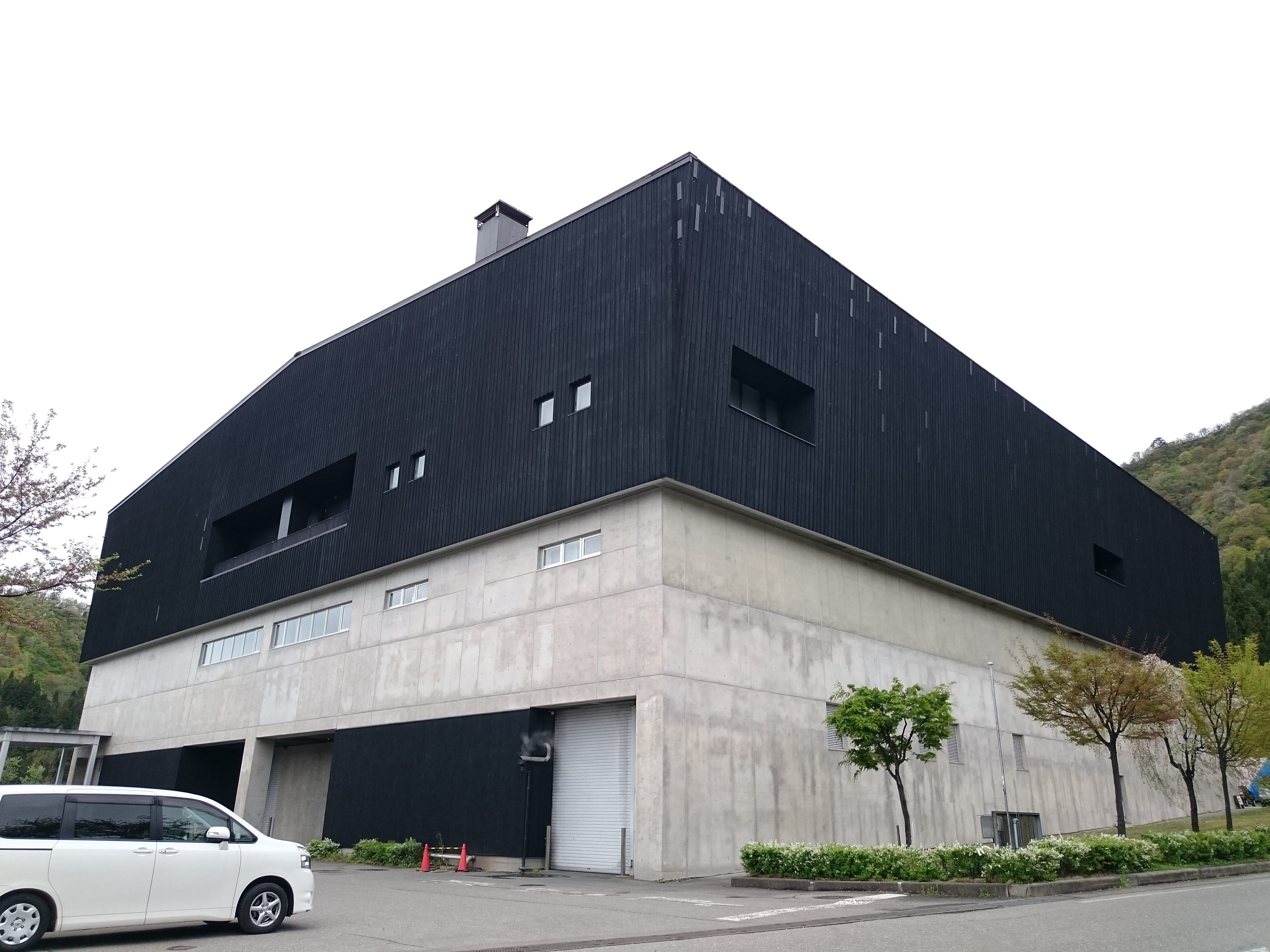 第二浩和蔵の外観